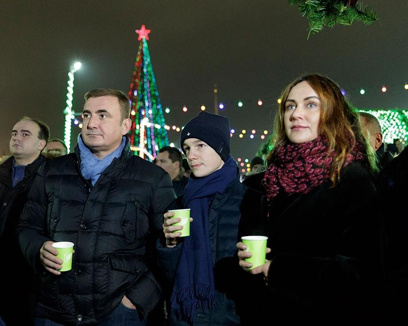 Губернатор Тульской Области А.Г. Дюмин с семьёй